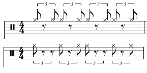 שמיניות טריאולה וסווינג